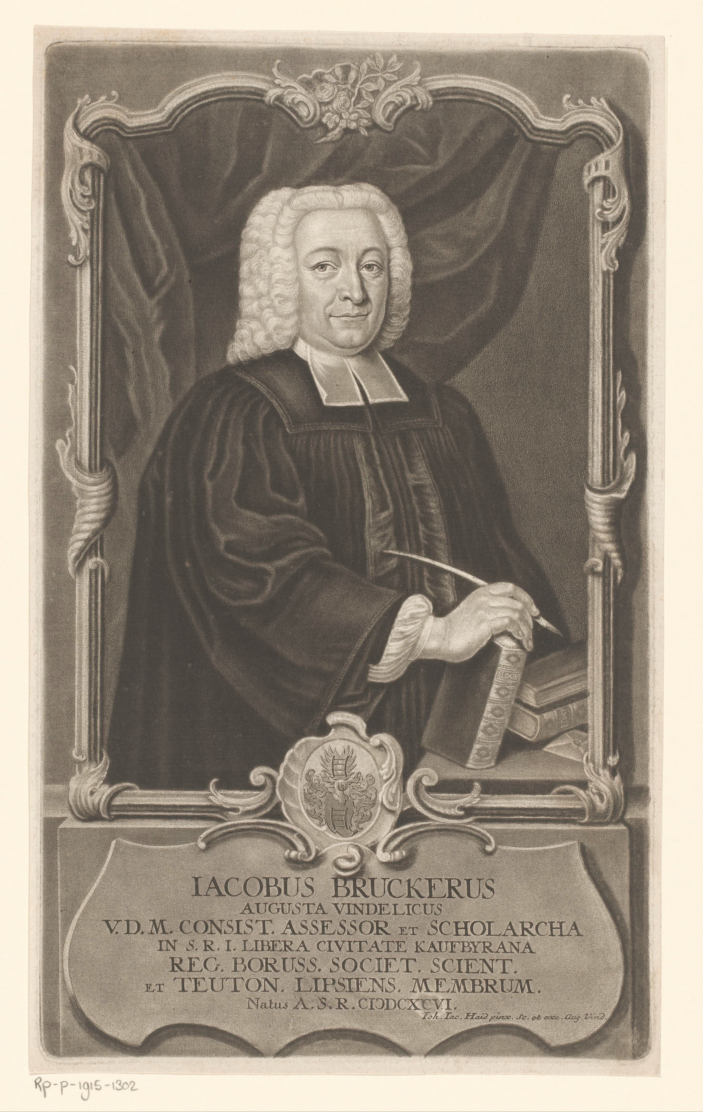 IdentificatieTitel(s): Portret van Jakob BruckerObjecttype: prent Objectnummer: RP-P-1915-1302Catalogusreferentie: HAB A 2910Opschriften / Merken: verzamelaarsmerk, verso, gestempeld: Lugt 2228VervaardigingVervaardiger: prentmaker: Johann Jacob Haid (vermeld op object)naar schilderij van: Johann Jacob Haid (vermeld op object)uitgever: Johann Jacob Haid (vermeld op object)Plaats vervaardiging: AugsburgDatering: 1741Materiaal: papier Techniek: mezzotint / etsenAfmetingen: plaatrand: h 308 mm × b 185 mmToelichtingPrent gebruikt voor: Brucker, Jacob. Bildersal heutiges Tages lebender und durch Gelahrheit berühmter Schrifftsteller. Augsburg: Johann Jacob Haid, 1741.OnderwerpWat: historical personsrocaille ornamentarmorial bearing, heraldrybooktheologianWie: Jacob BruckerVerwerving en rechtenVerwerving: aankoop 1905Copyright: Publiek domein